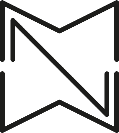 Auf dem Bild kann man die Buchstaben "MNW" erkennen, die für das "MalerinnenNetzWerk" stehen.